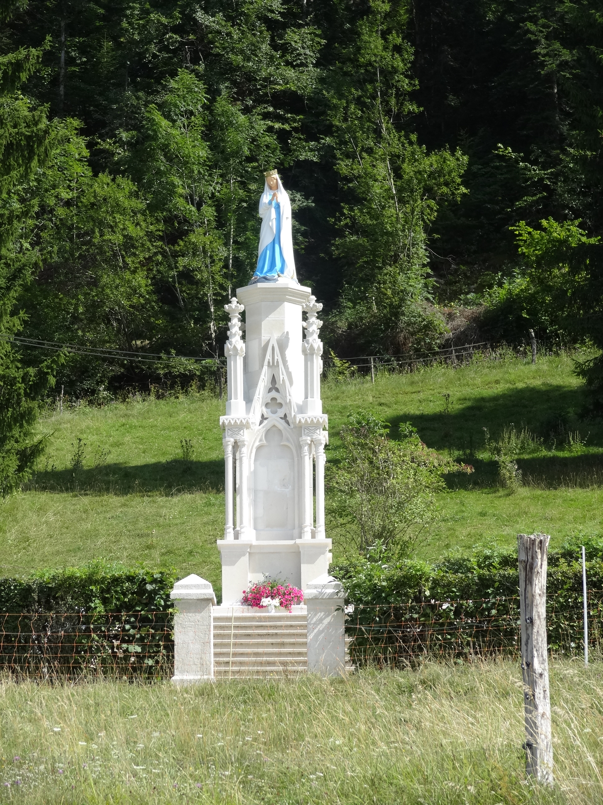 Bians-les-Usiers (Doubs) - Vierge sur la route de la Côte